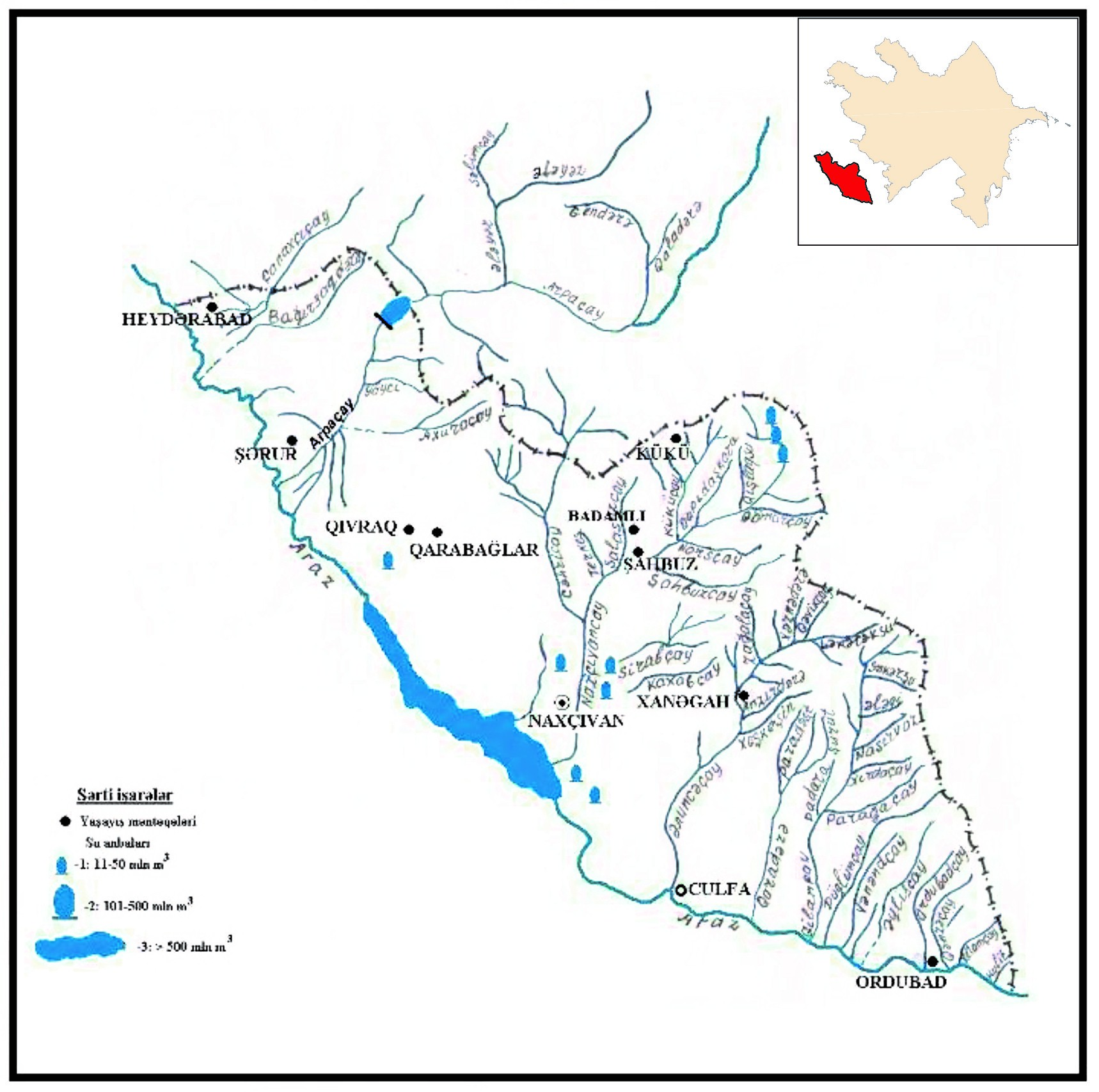 Orta Araz təbii vilayətinin çay şəbəkəsi.